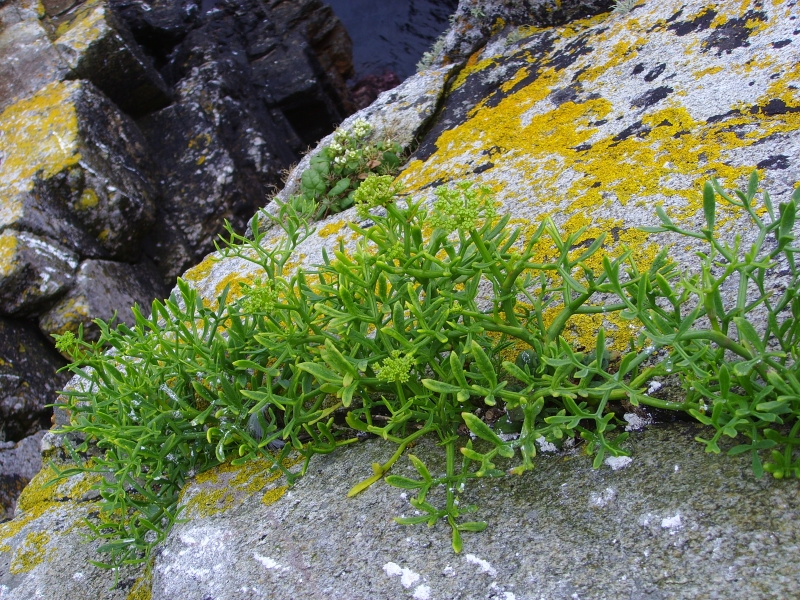 Perce-pierre (Crithmum maritimum), Cap Sizun, Bretagne, France